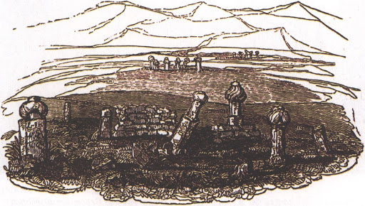 Татарское (в оригинале – «турецкое») кладбище в Симферополе. Гравюра Дж. Кларка с рисунка У. Ньюнема. 1830 г. Из книги «Крымские путешествия: Джеймс Уэбстер и его вояж по Крыму в 1827 г.». Симферополь, 2016.